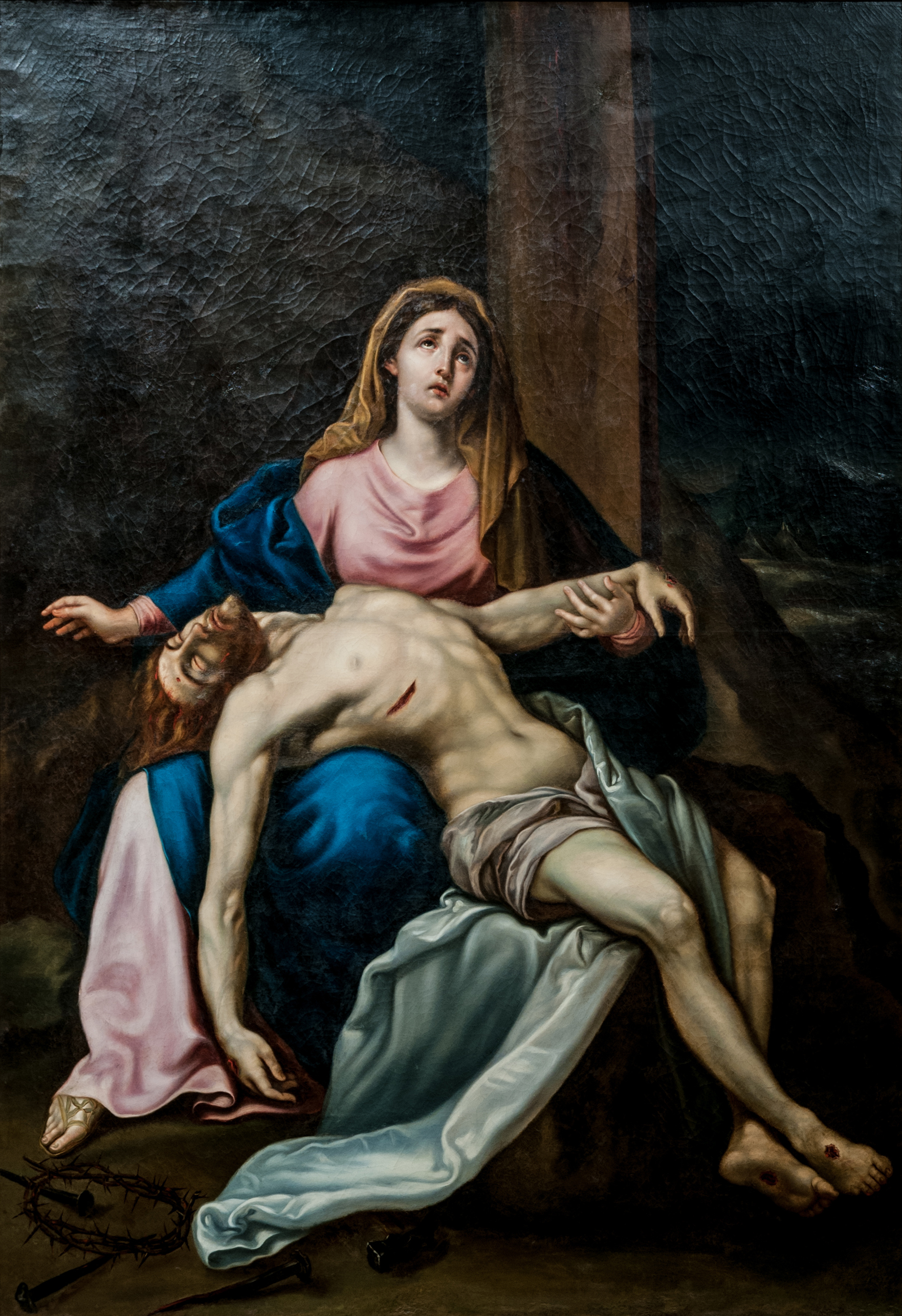 Galería de Arte Nacional. Caracas - Venezuela. - Hernández Caballero, Serafín (Editor). (1998): Gran Enciclopedia de Venezuela. Editorial Globe, C.A. Caracas. 10 volúmenes. ISBN 980-6427-00-9 ISBN 980-6427-10-6